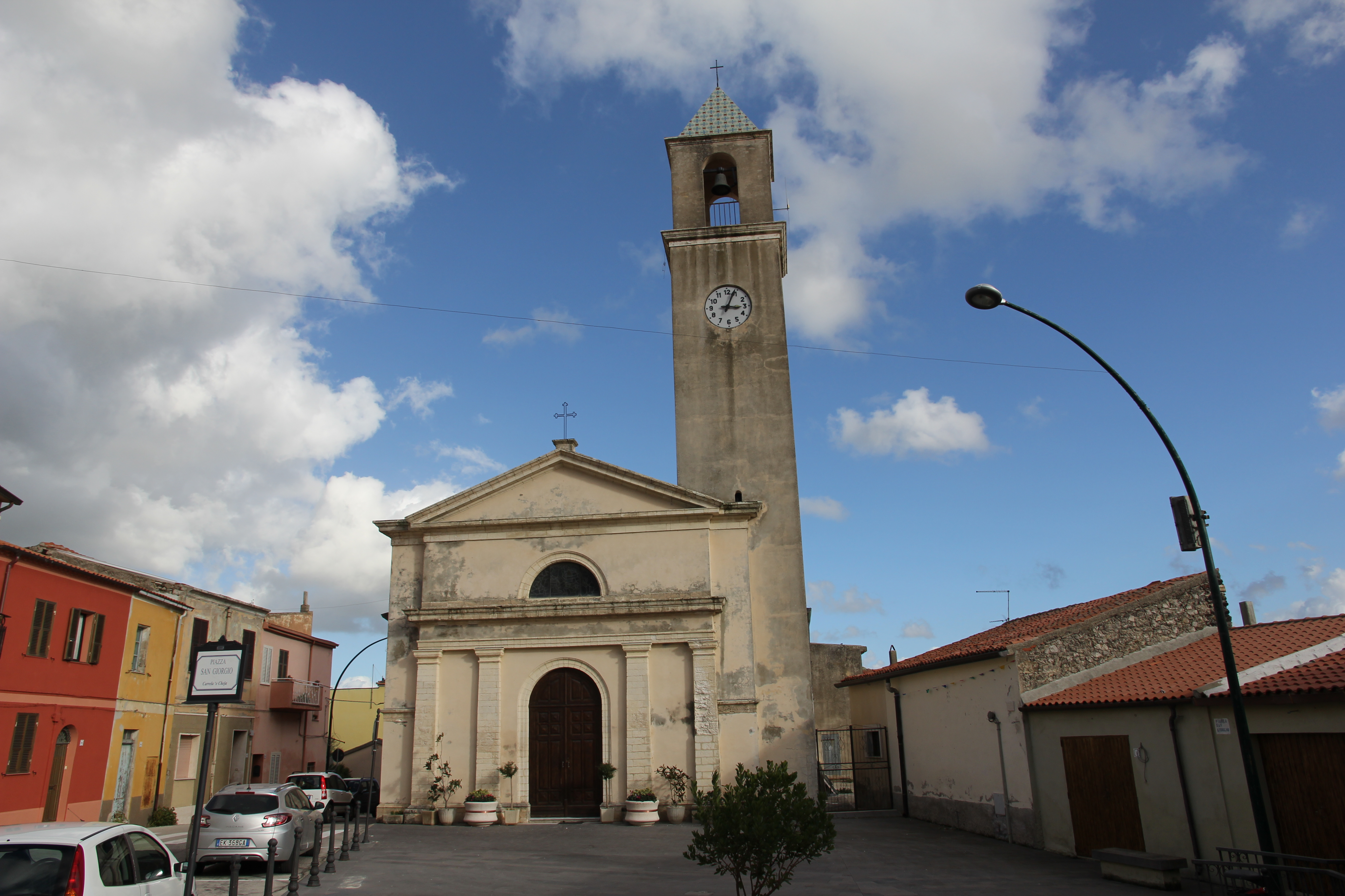 Bonnanaro - Chiesa Parrocchiale di San Giorgio